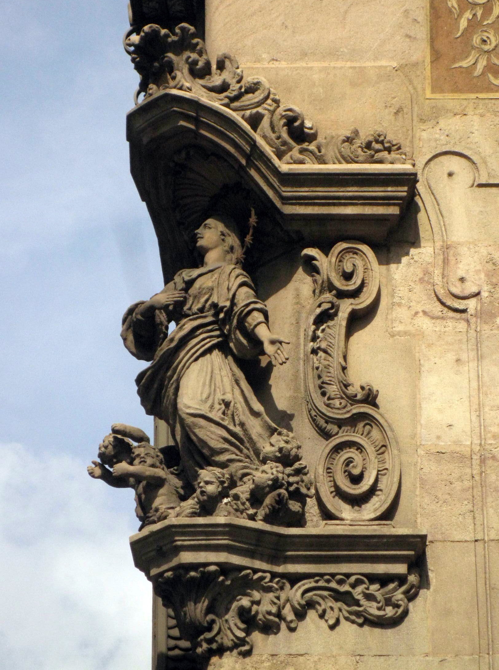 Mare de Déu dels Àngels (Joan Enrich). Via Laietana, 56 (Barcelona)